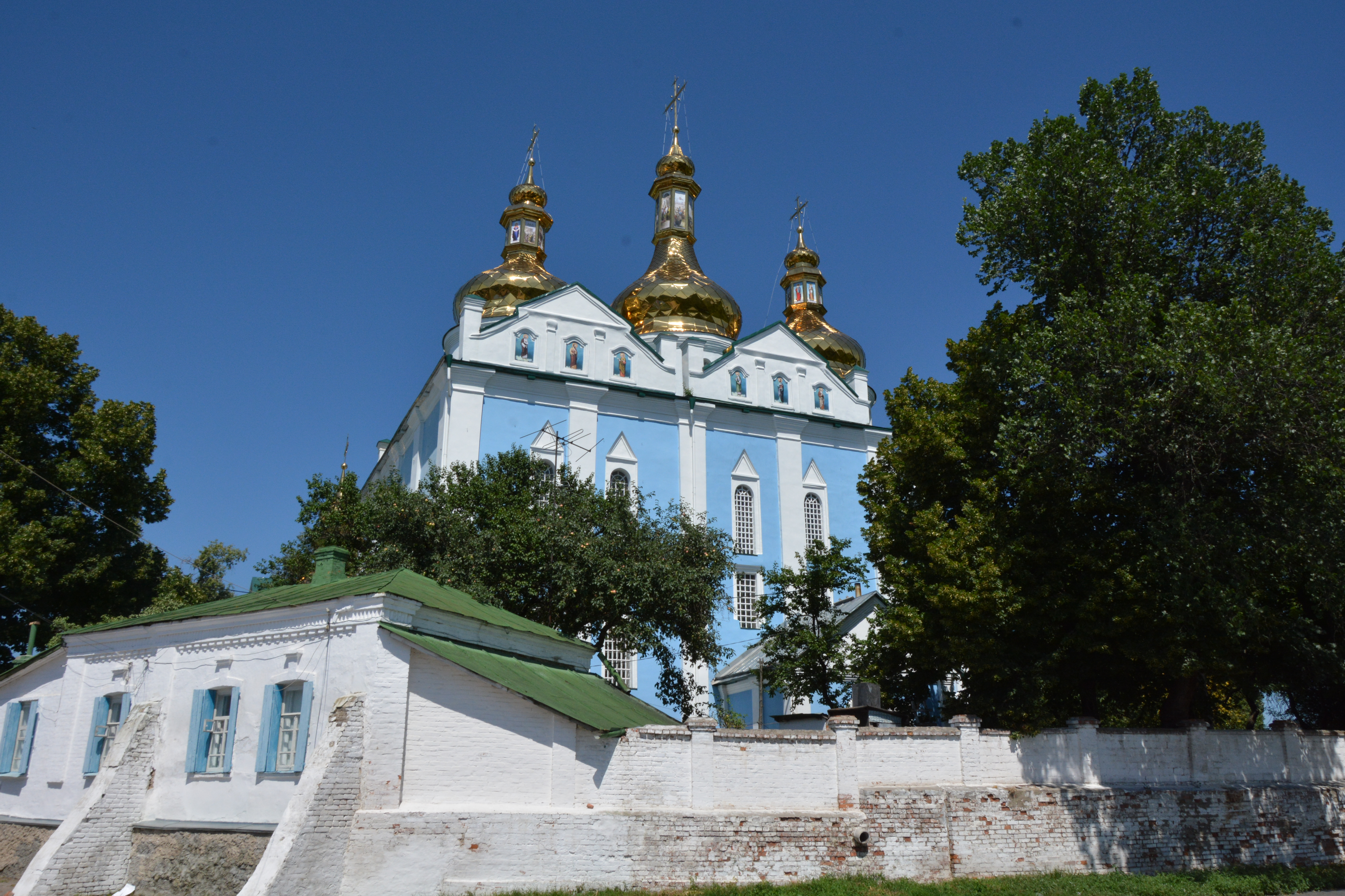 Святодухівський собор (мур.), Ромни, пл. Базарна, 17